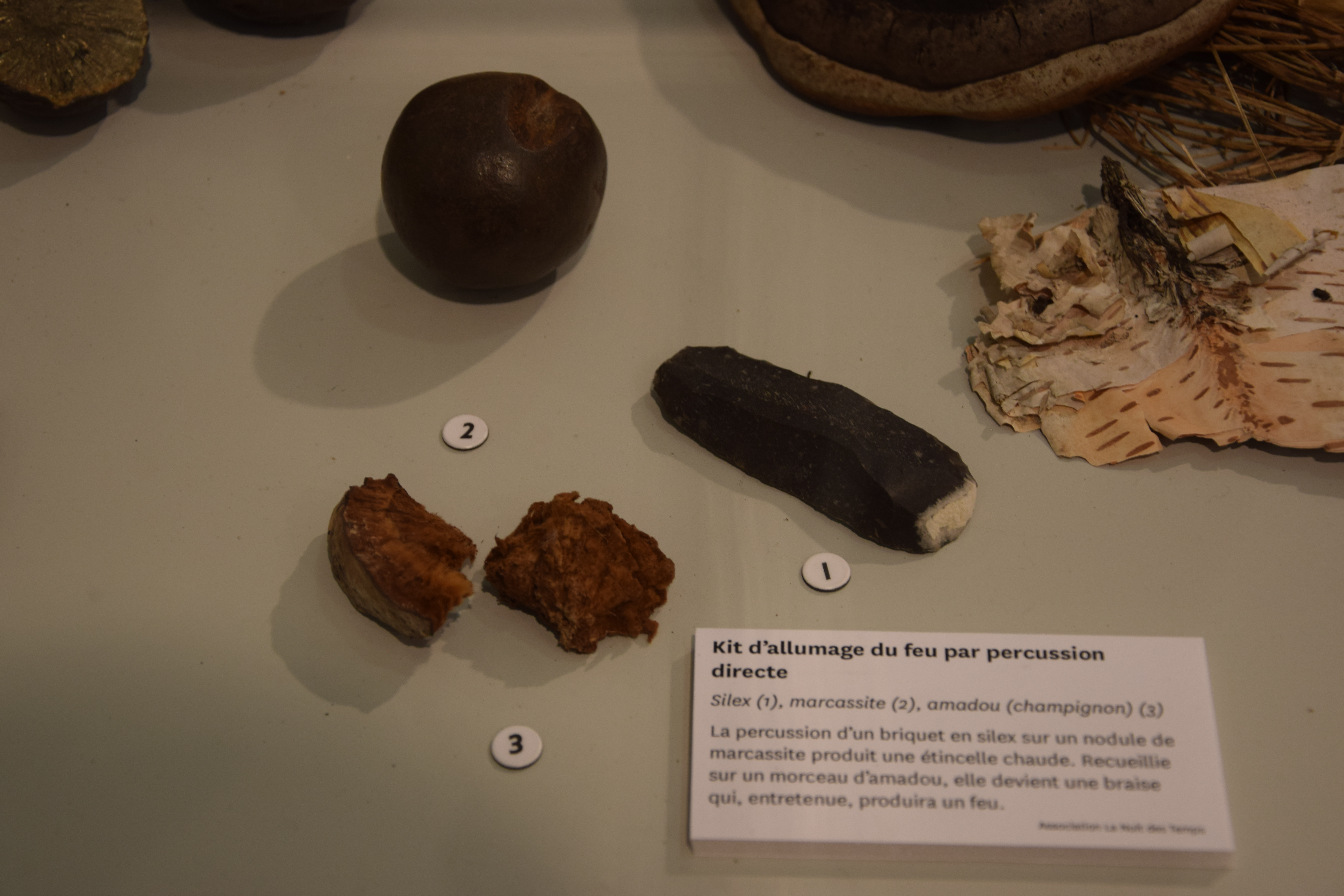 collection du musée Arkéos